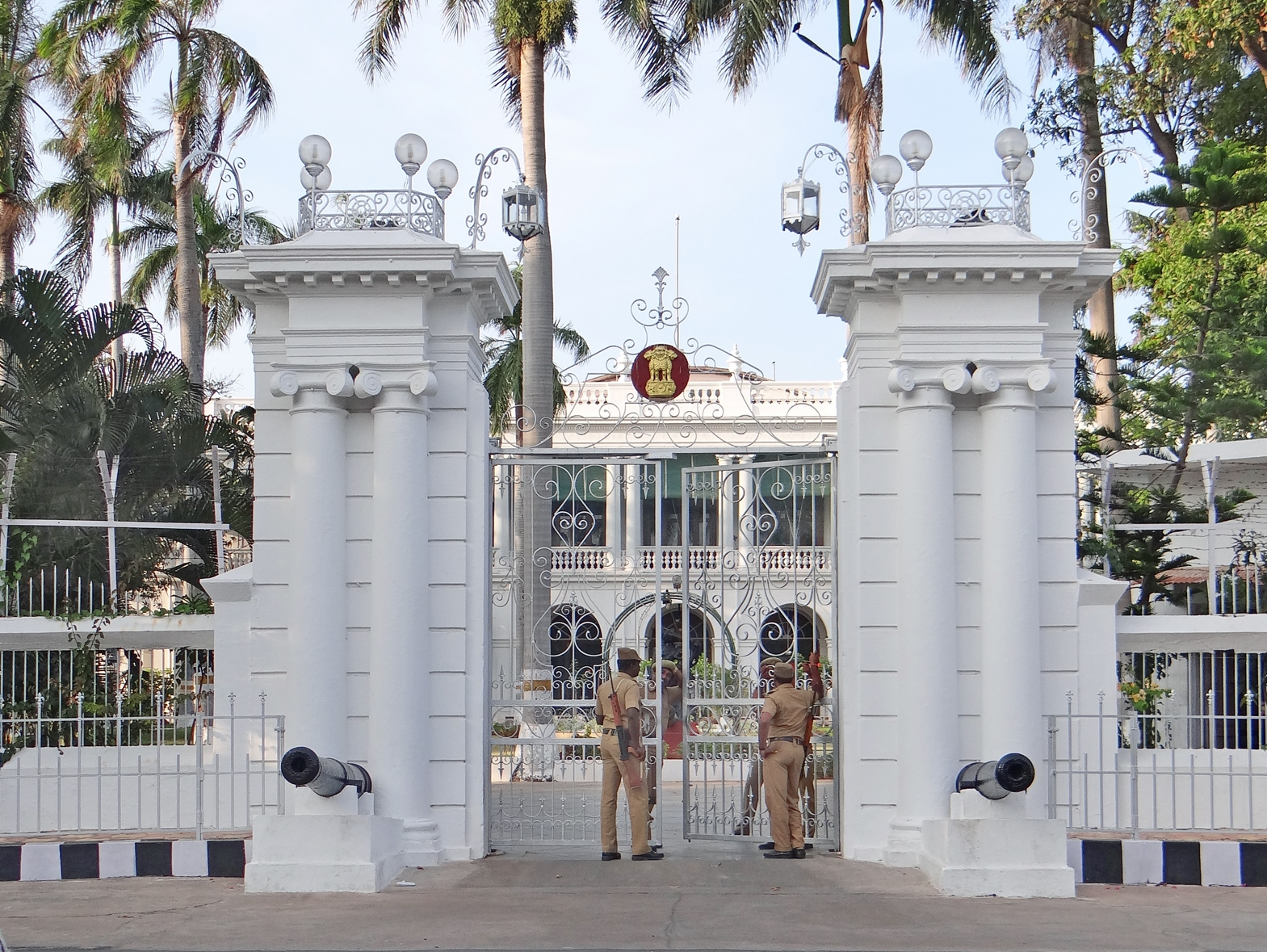 Le Palais du Gouvernement (Raj Niwas) représente un mélange de l’architecture française et indienne. Autrefois Palais du Gouverneur français de Pondichéry, elle est aujourd’hui la résidence du Lieutenant Gouverneur.